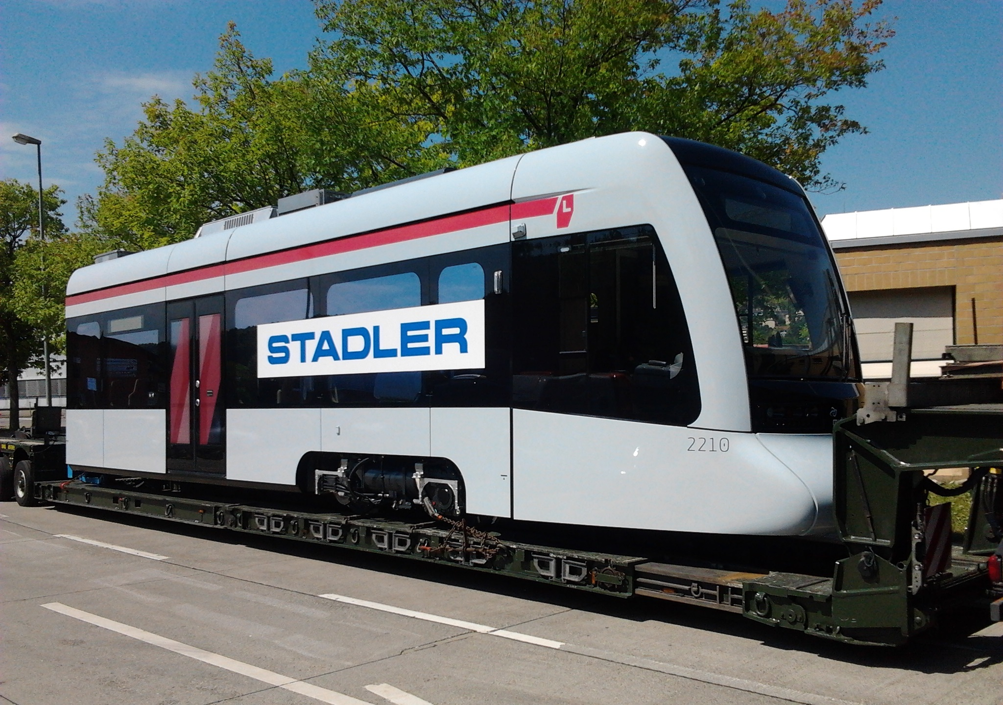 Steuerwagen des Stadler Tango für Aarhus Letbane auf einem Straßentransporter bei der Zollabfertigung im Zollamt Bietingen